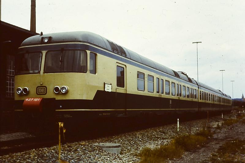 DB Triebzug Baureihe 427 im August 1983 im Bahnbetriebswerk Tübingen